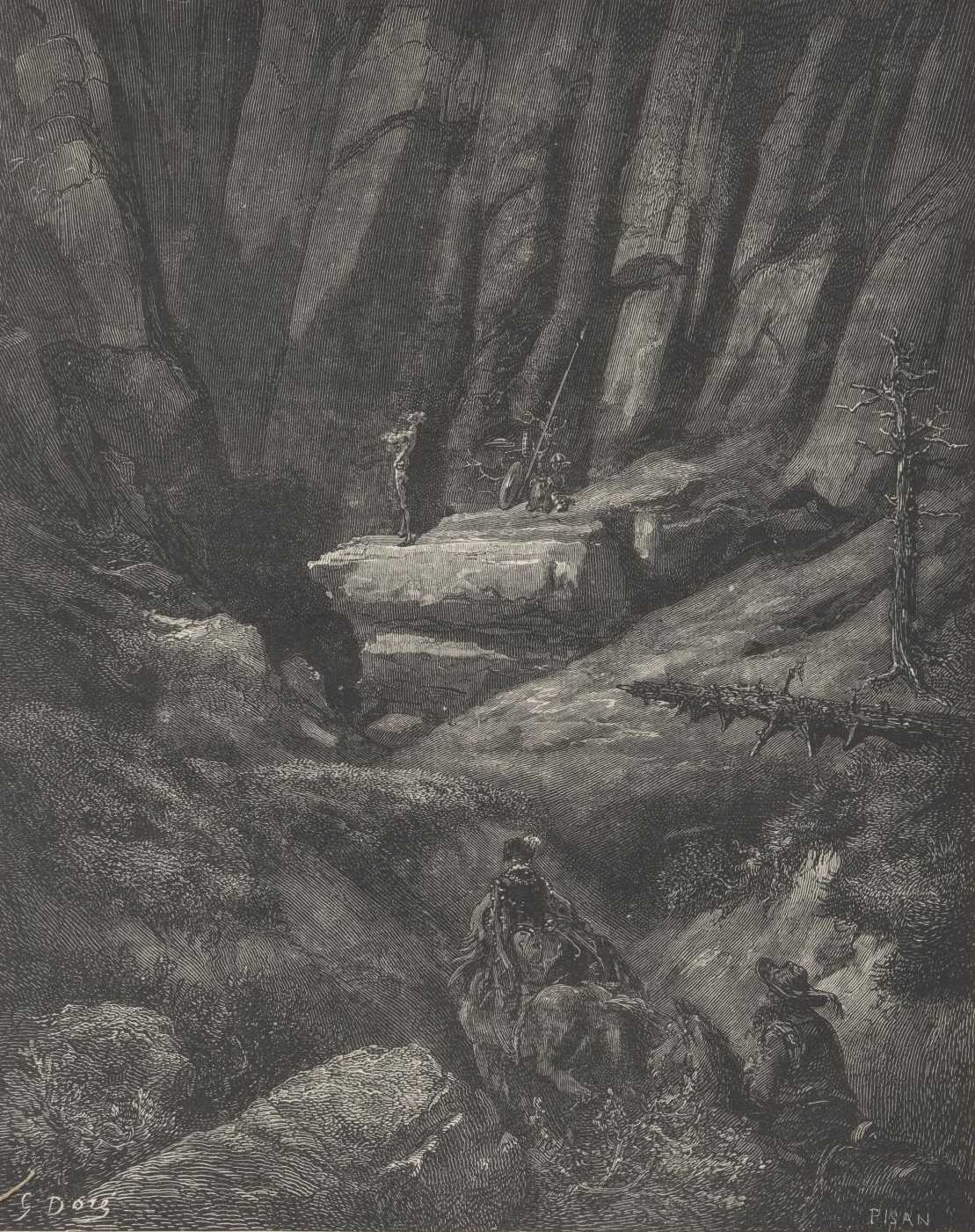 Ilustração de Gustave Doré para a edição de 1863 de "Dom Quixote" de Miguel de Cervantes